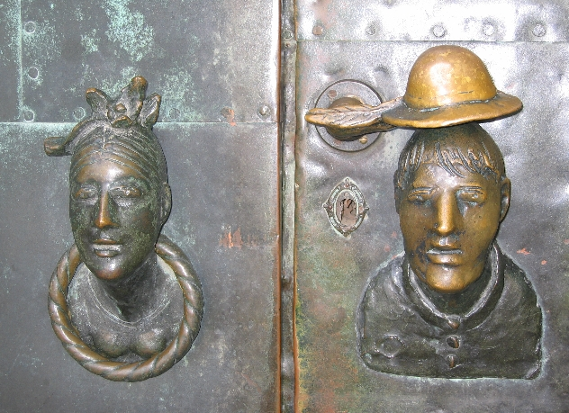 Detail der Eingangspforte des Klosters Unser Lieben Frauen in Magdeburg/Germany